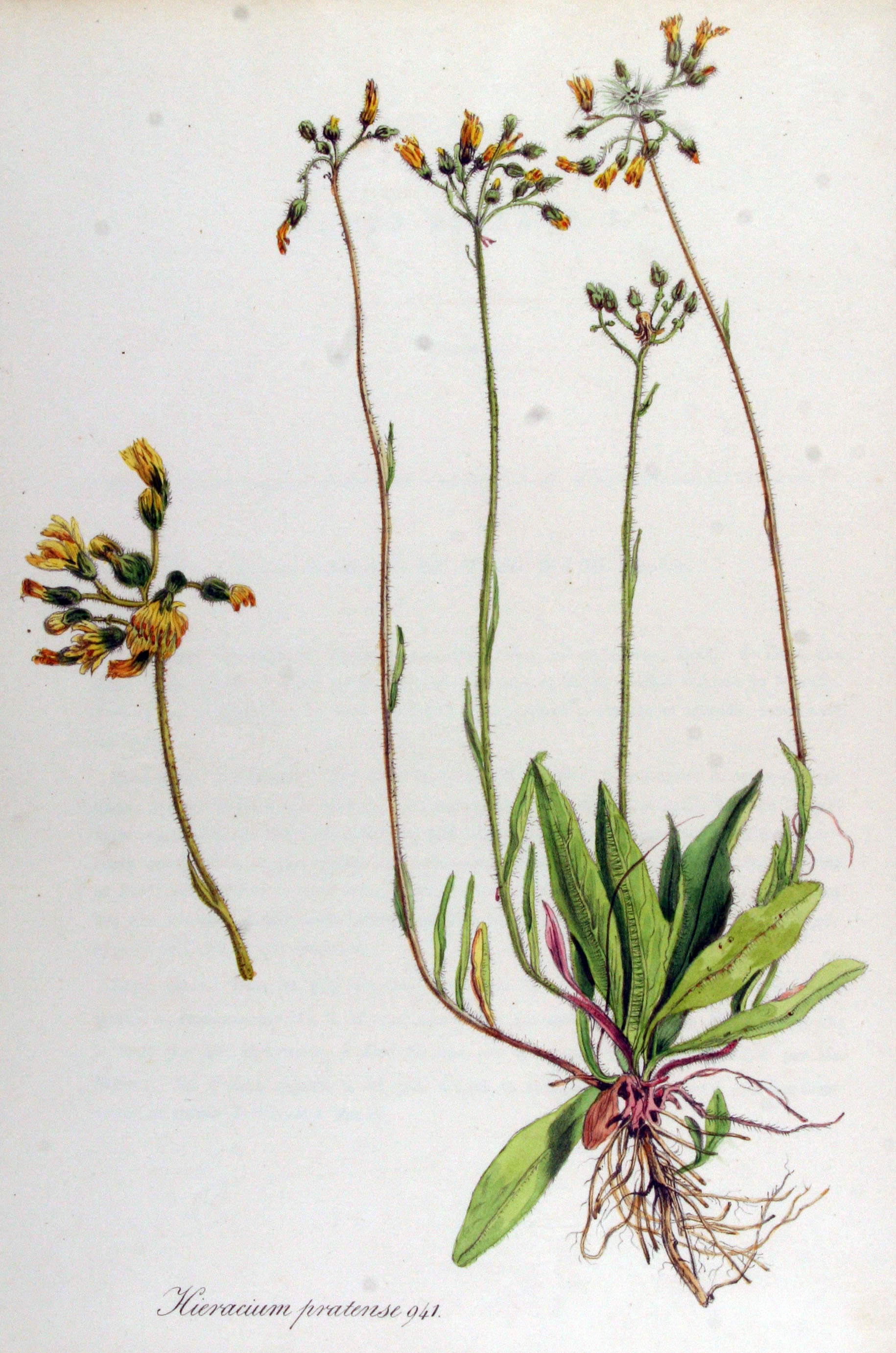 Hieracium caespitosum Dum. (Syn. Hieracium pratense Tausch)